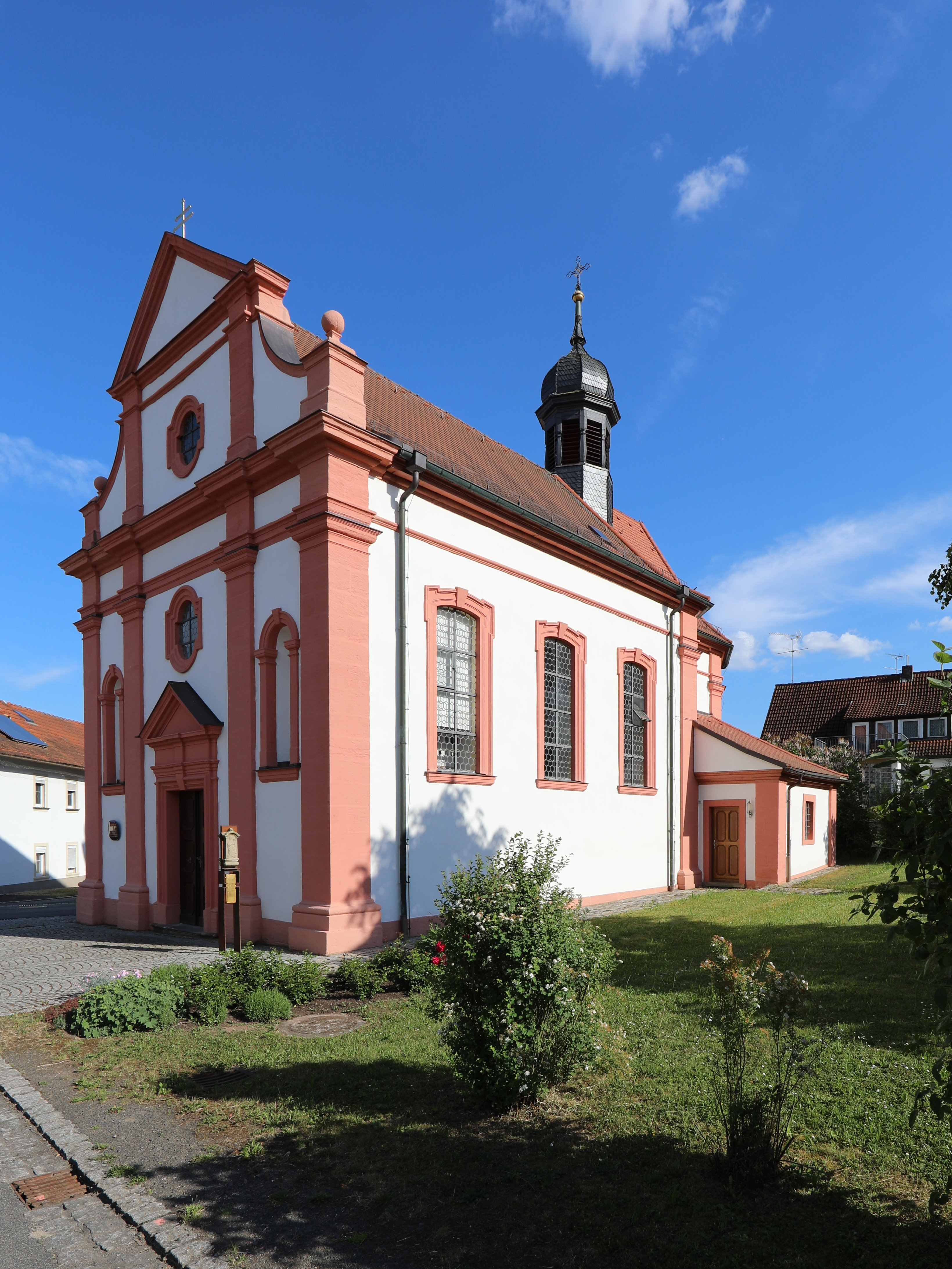 Katholische Filialkirche Mariä Heimsuchung in Neuses am Raueneck